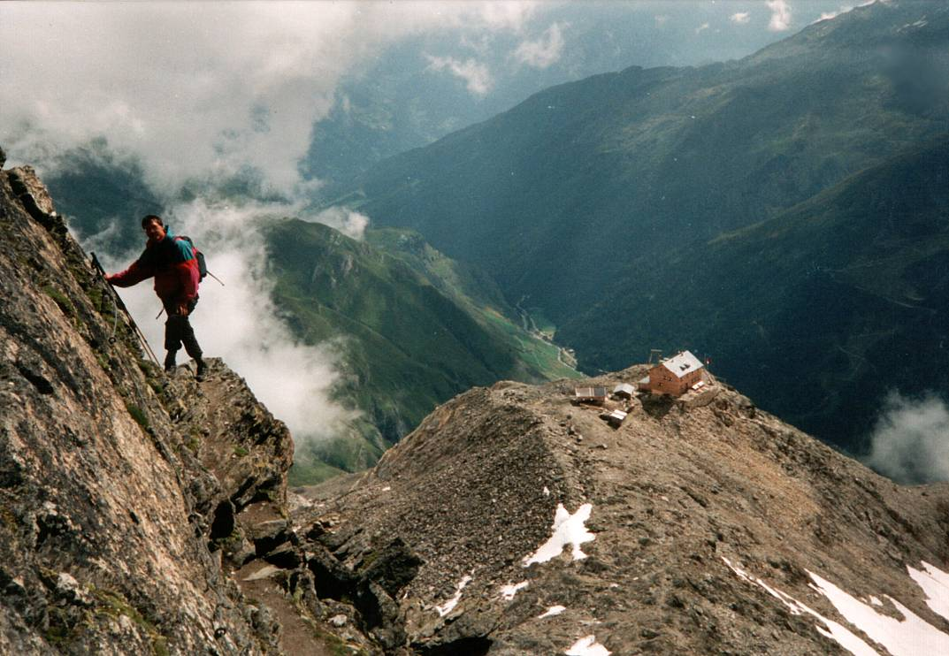 Blick zur Zwickauer Hütte selbst fotografiert am 18. August 1997